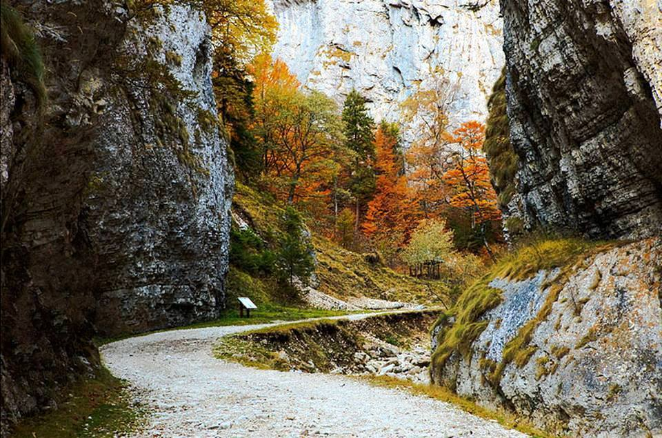 Prăpăstiile de lângă Zărnești văzute în octombrie